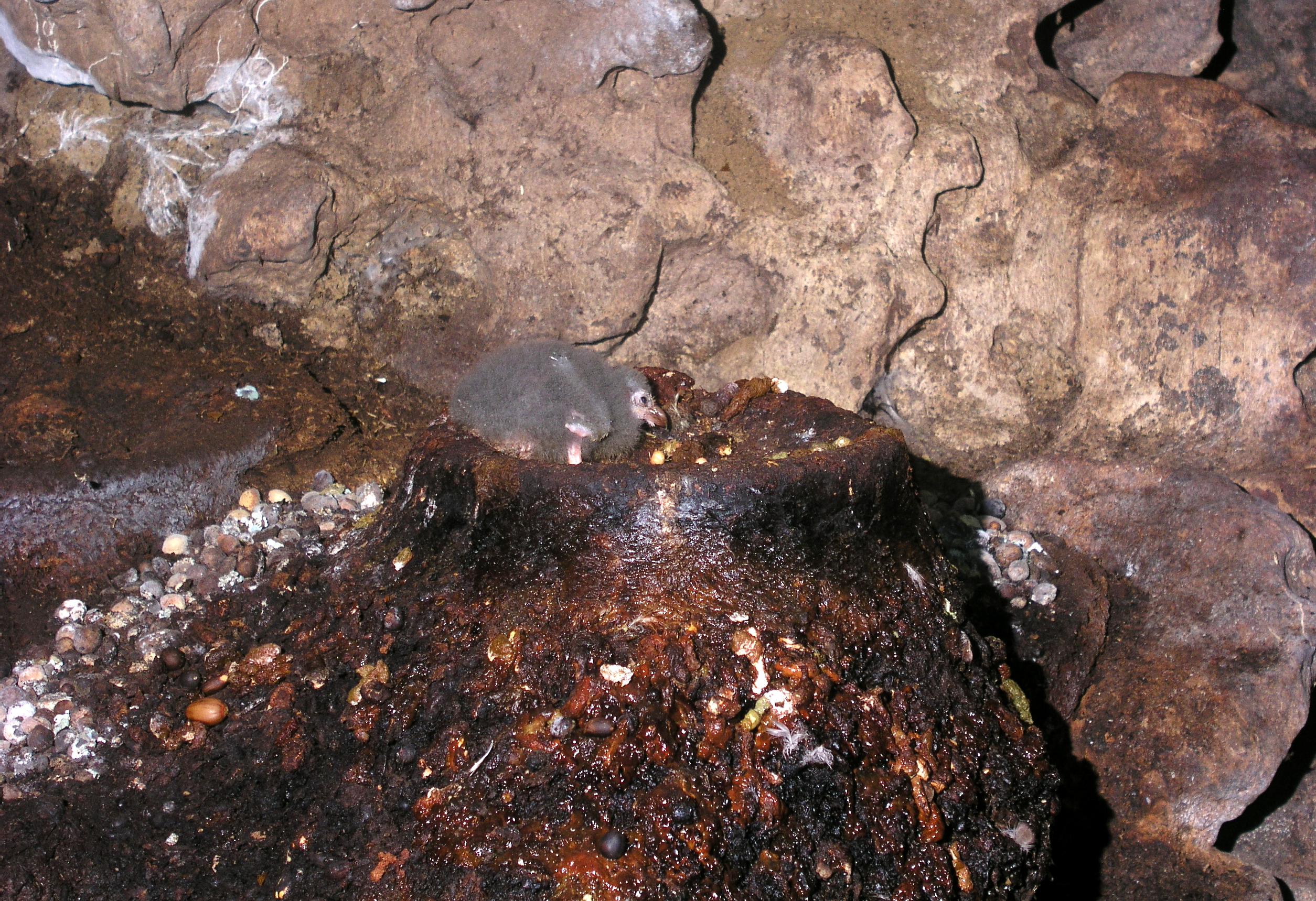 Poussin guacharo au nid (Cueva de Cacapishco, Chirimoto, Rodriguez de Mendoza, Amazonas, Pérou).